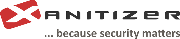 Xanitizer Logo